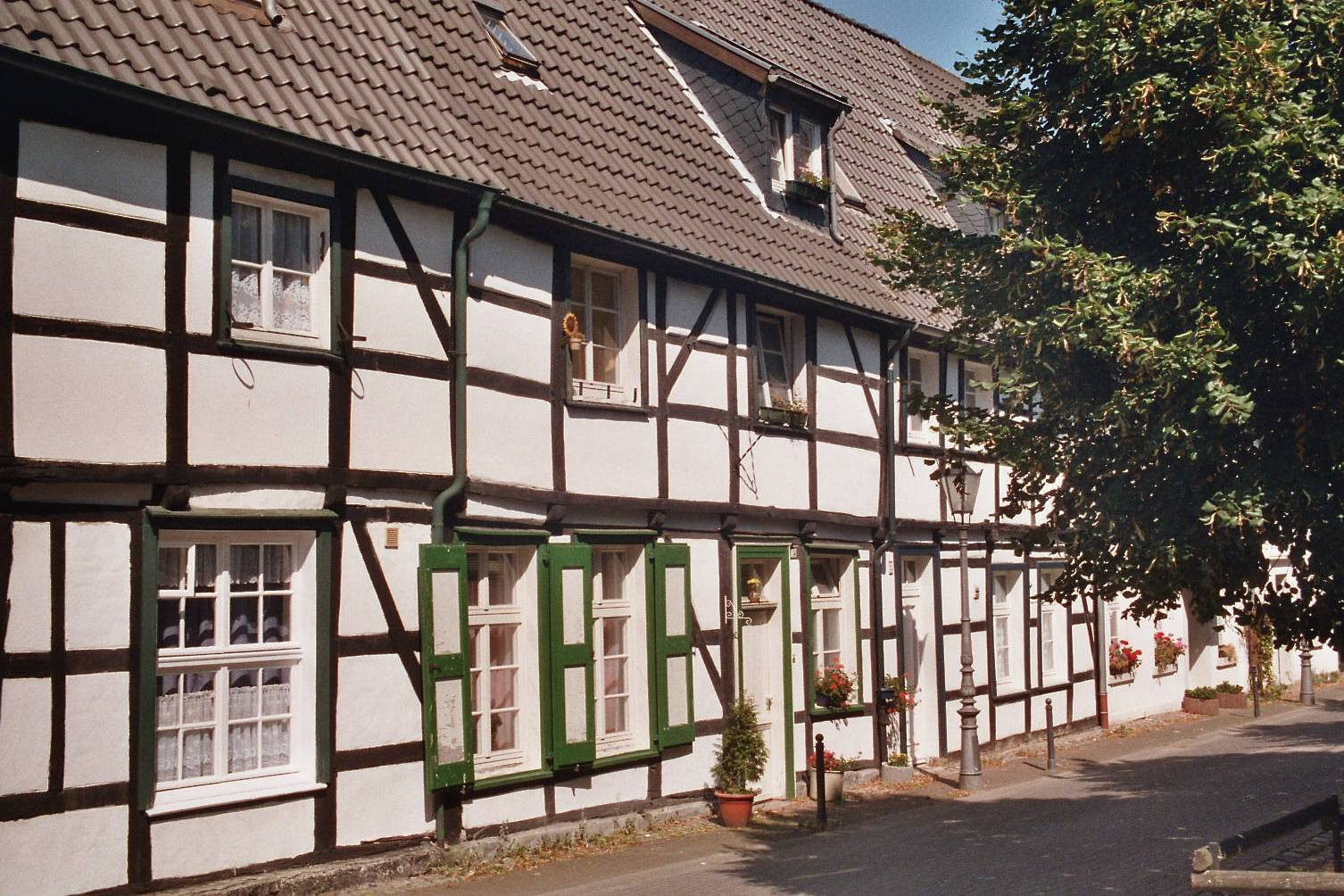 Baudenkmal: Teil der Langen Riege in Hagen-Eilpe This is a photograph of an architectural monument. It is on the list of cultural monuments of Hagen